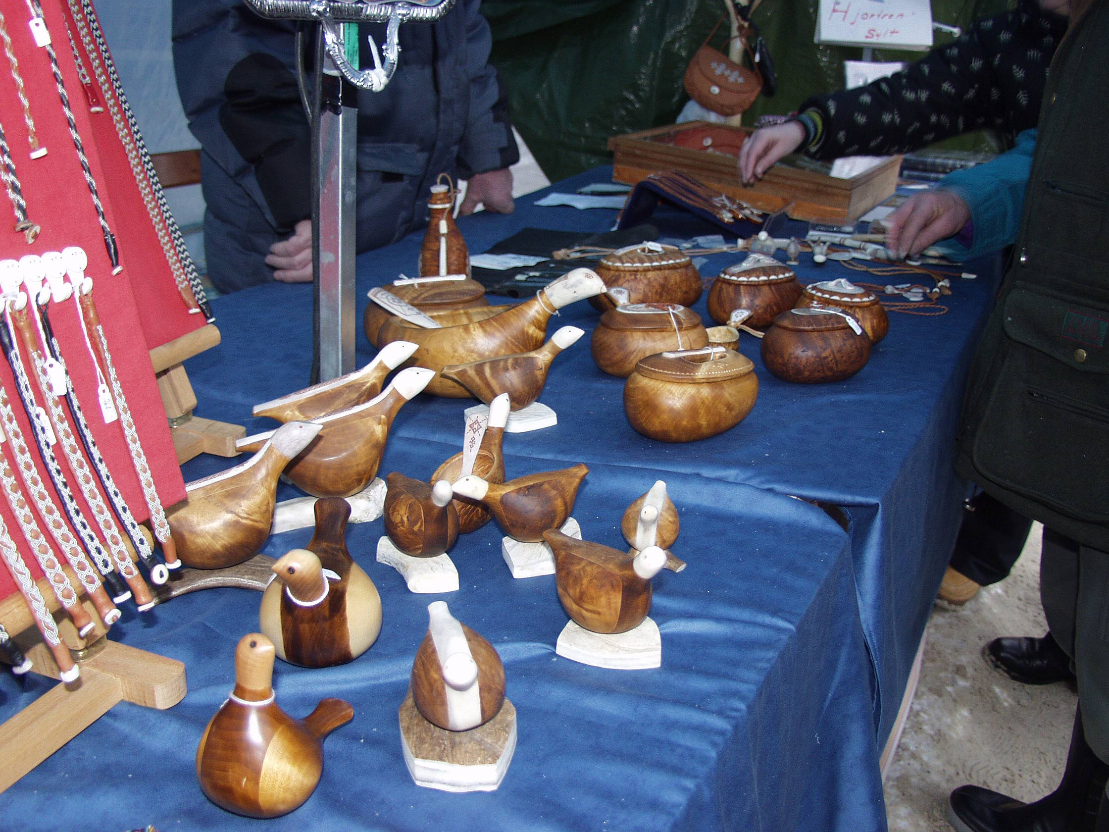 Samisches Kunsthandwerk beim Jokkmokksmarkt 2005